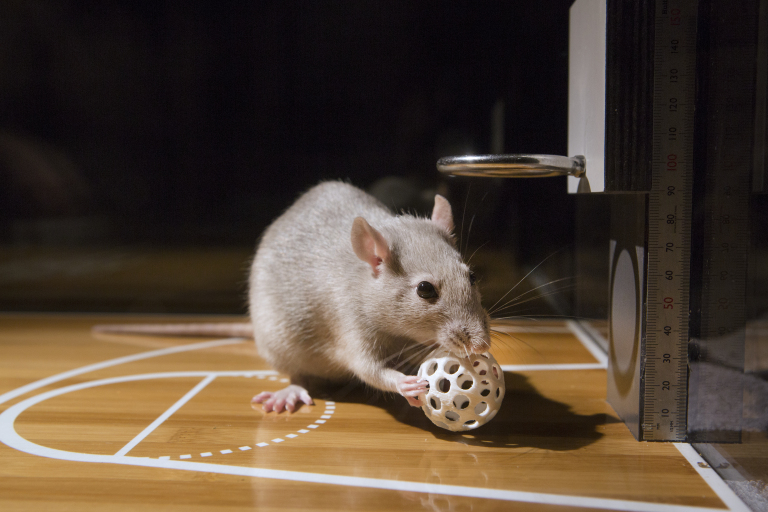 Pildil on rott spetsiaalse "korvpalliga".